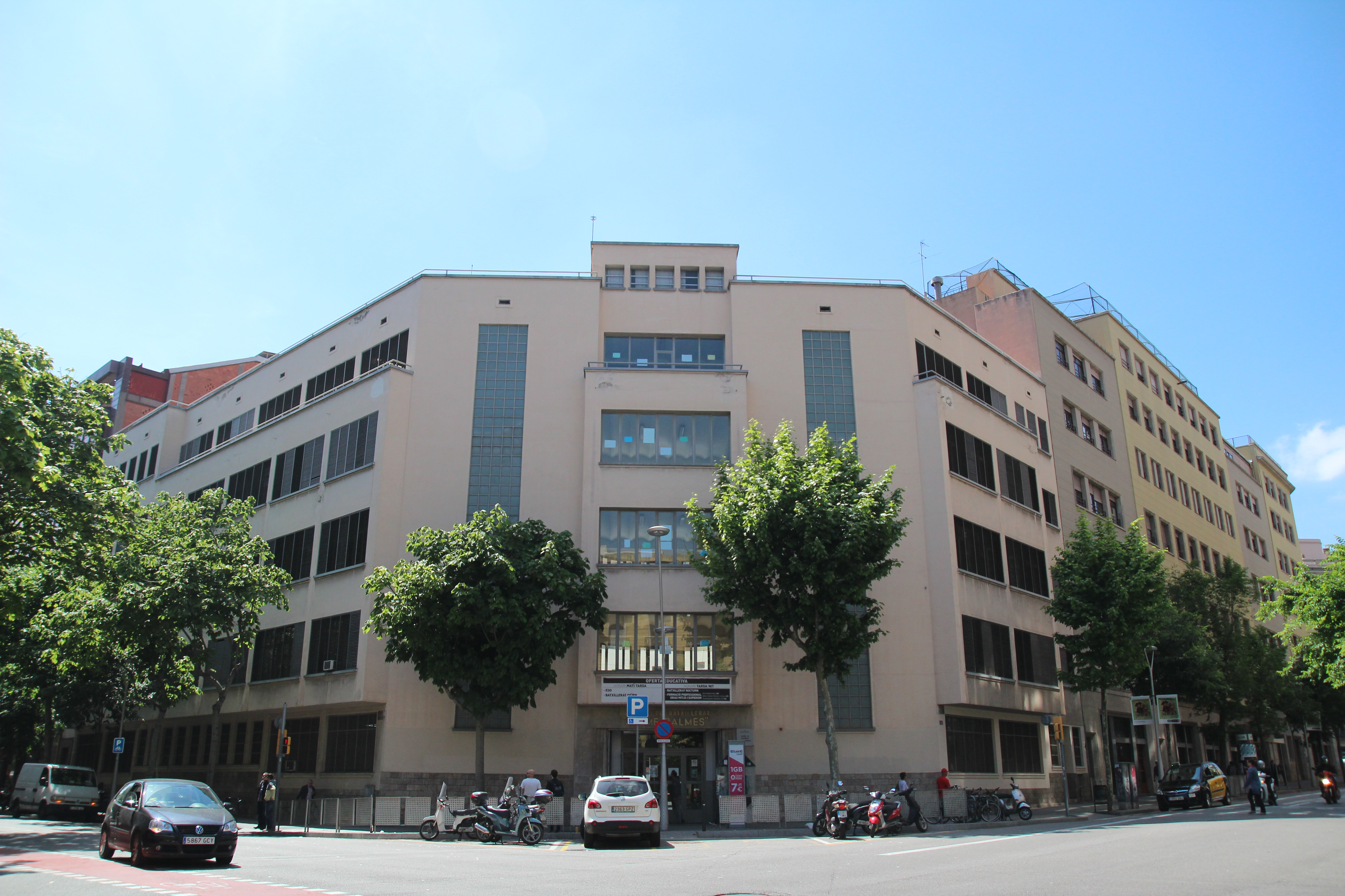 Façana de l'edifici de l'Institut Jaume Balmes de Barcelona al 2014.